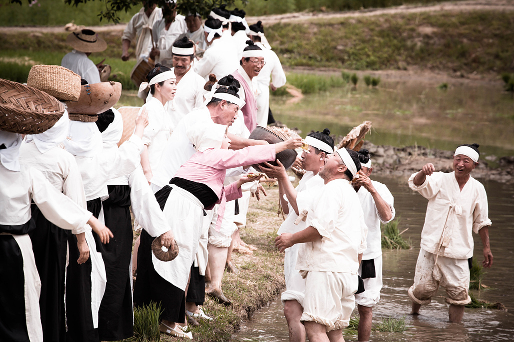 증평시민들이 장뜰두레놀이의 농요행사를 시범으로 선보이고 있다.